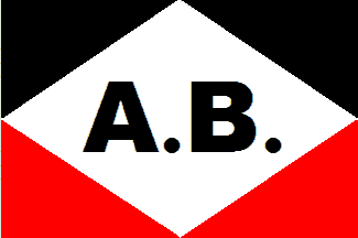 Logo der Arnold Bernstein Schiffahrtgesellschaft